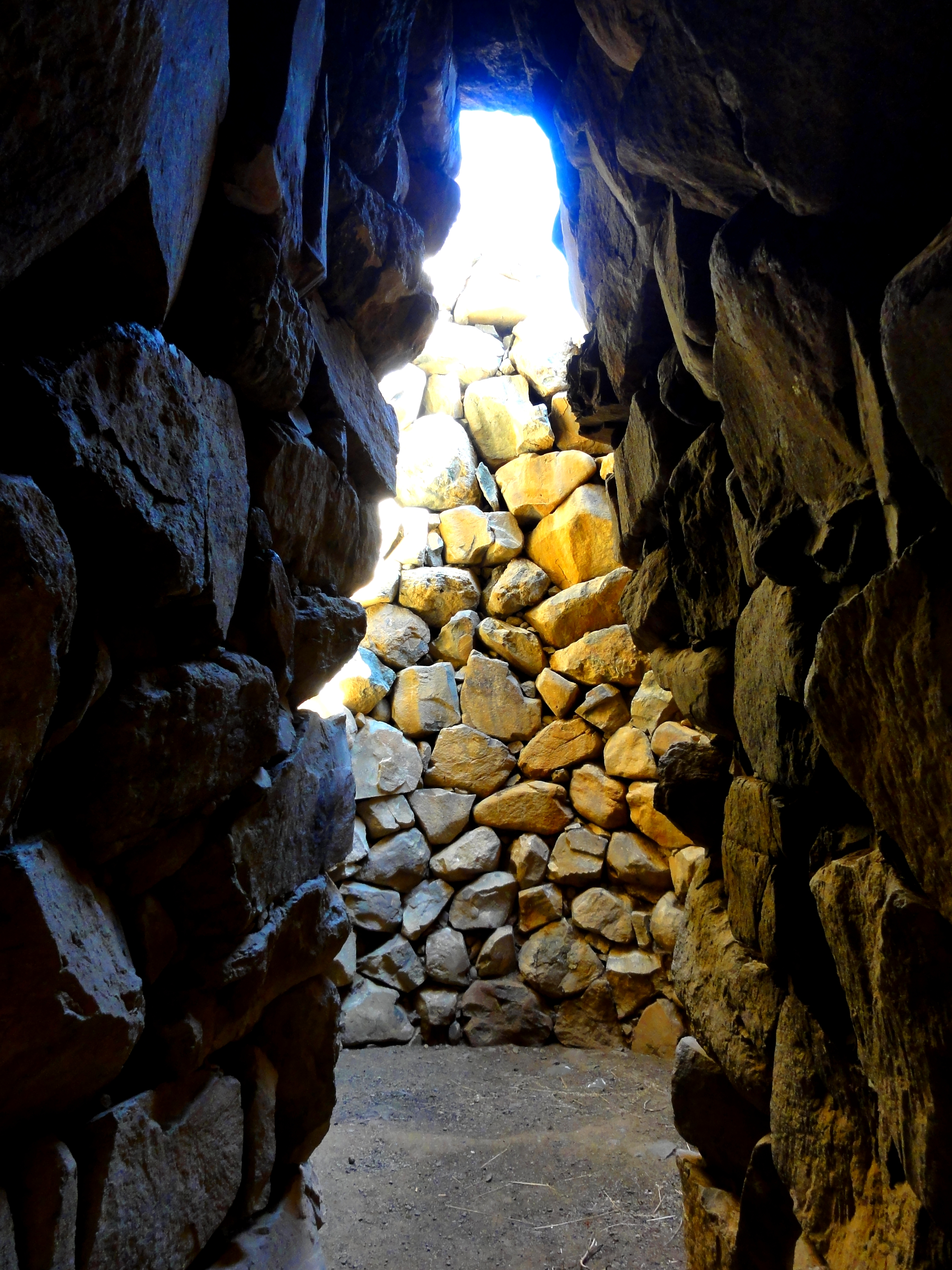 Nuraghe Sa Domu 'e S'Orku - MIBAC This is a photo of a monument which is part of cultural heritage of Italy.